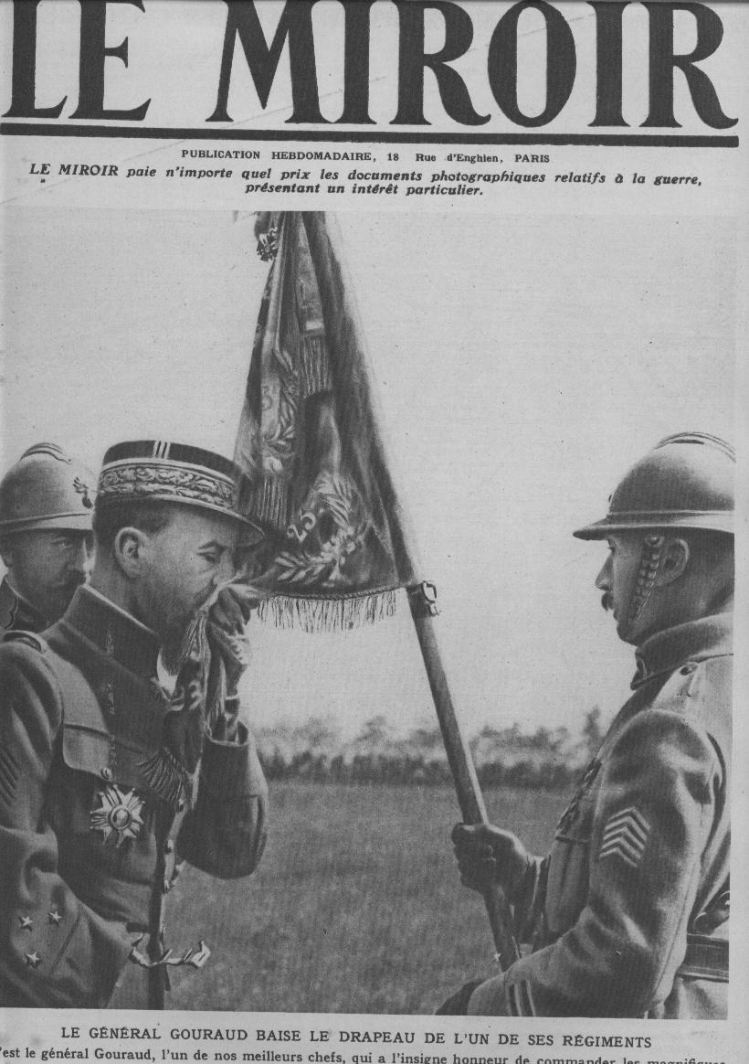 N° 244 du magasine Le Miroir, en couverture le général Gouraud et le drapeau du 23e RI défendant Reims.